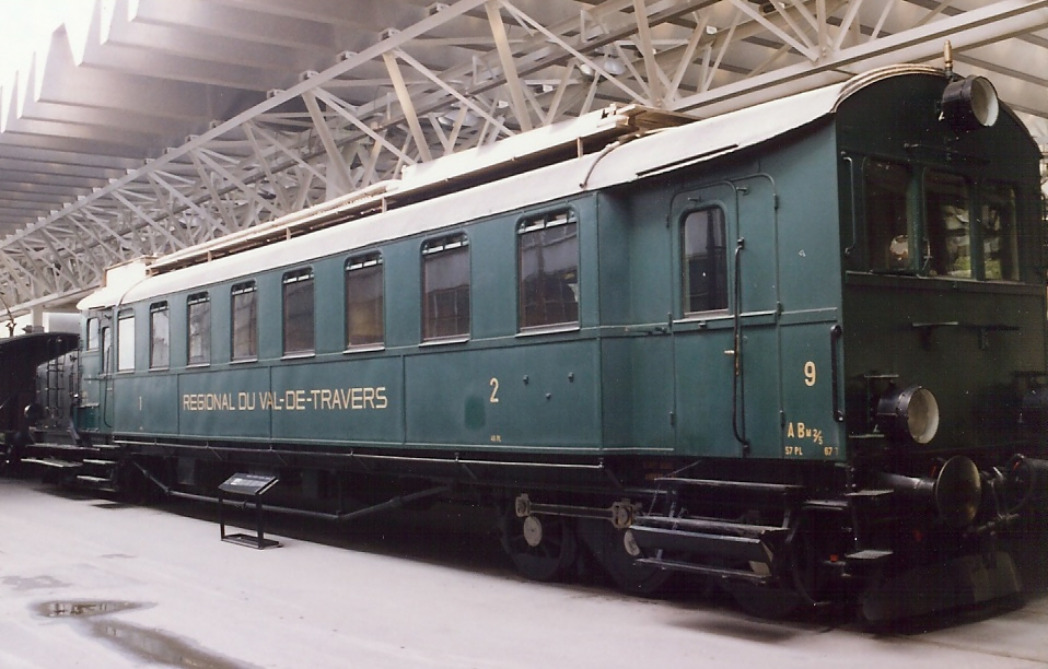 Dieseltriebwagen BCm 2/5 Nummer 9 der RVT, Baujahr 1914 im VHS Luzern ausgestellt